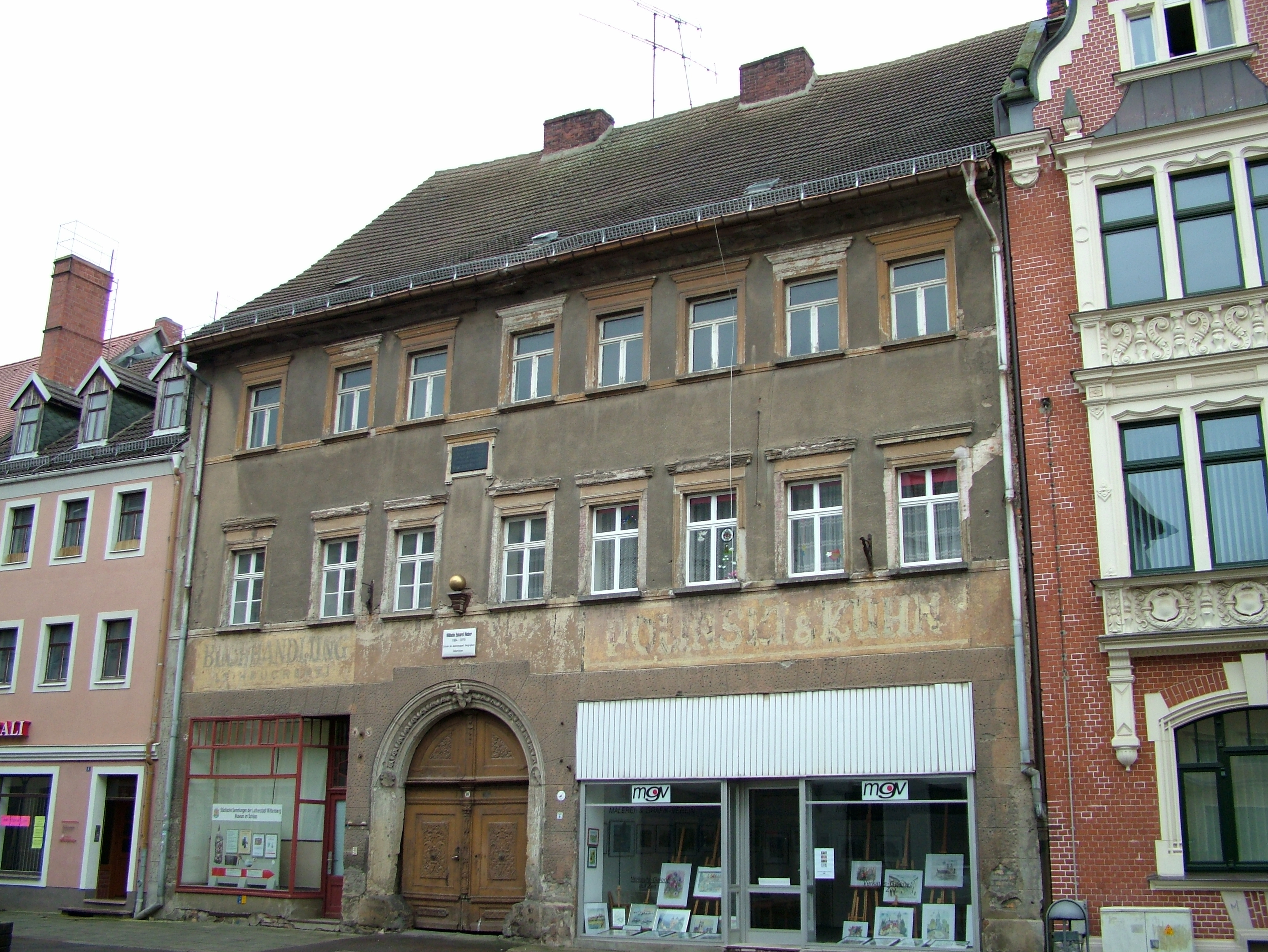 Lutherstadt Wittenberg in Sachsen-Anhalt. Das Haus ist das Geburtshaus des Physikers Wilhelm Weber. Über dem Tor befindet sich eine Gedenktafel mit einer Kugel.